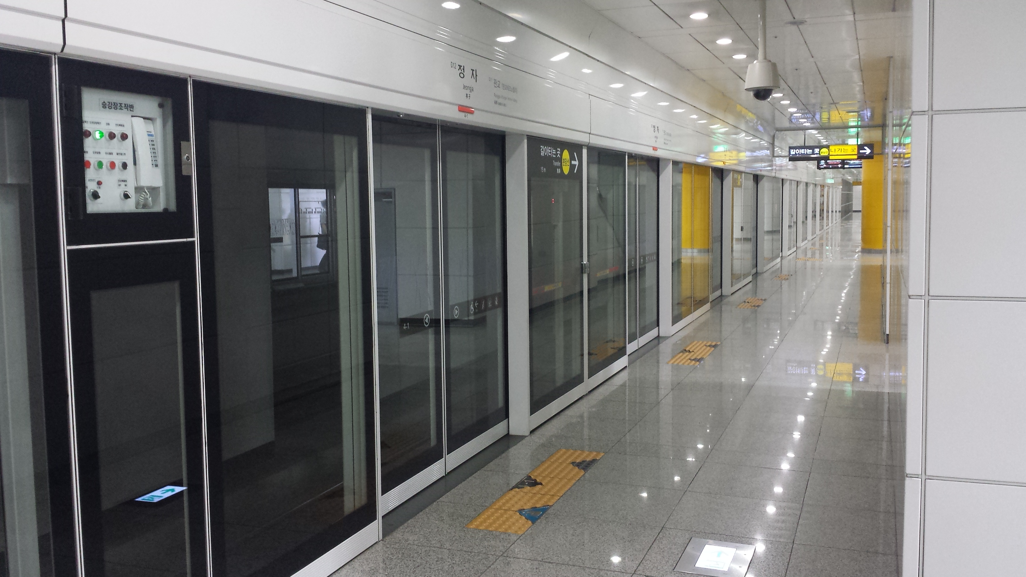 정자역 신분당선 역명판